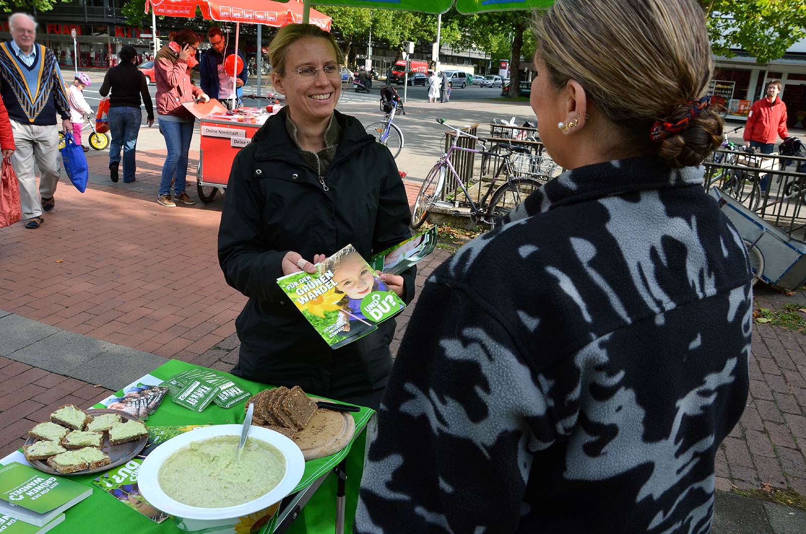 Am Samstag vor der Bundestagswahl 2013 legten hatten Mitglieder der verschiedenen Parteien auch am Klagesmarkt in Hannover ihre Informationsstände aufgebaut. Hier trafen Bürger etwa auf Maaret Westphely vom Bündnis90/Die Grünen und Abgeordnete im Niedersächsischen Landtag ...